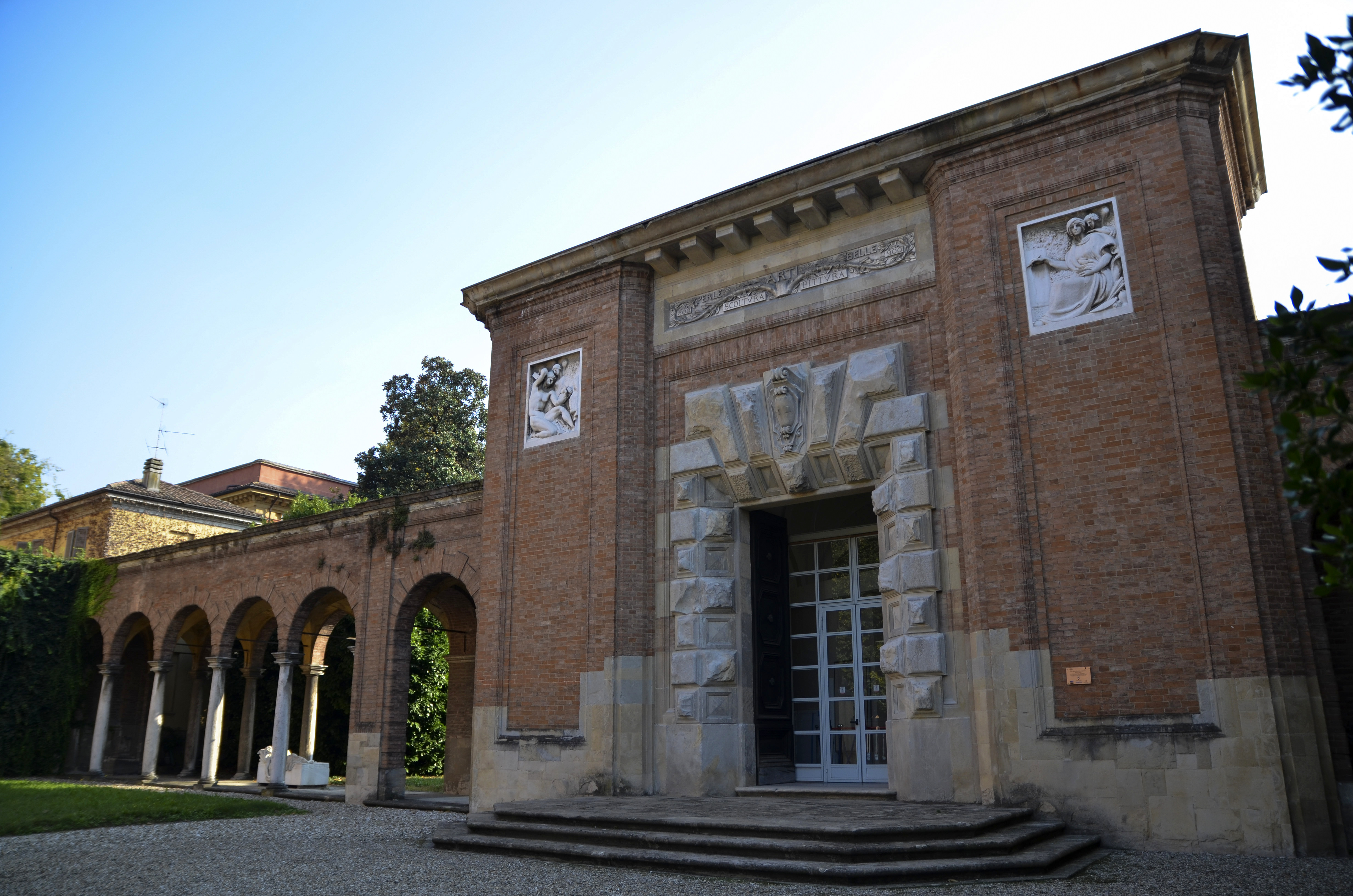 Edificio storico sede della Galleria Ricci Oddi This is a photo of a monument which is part of cultural heritage of Italy.